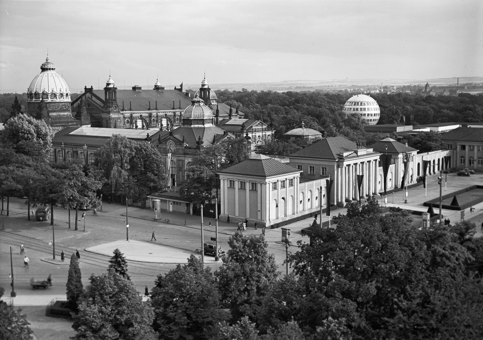 Neues Städtisches Ausstellungsgebäude, Dresden. Archtiekten Hans Erlwein und Karl Hirschmann. Erbaut 1914-1916